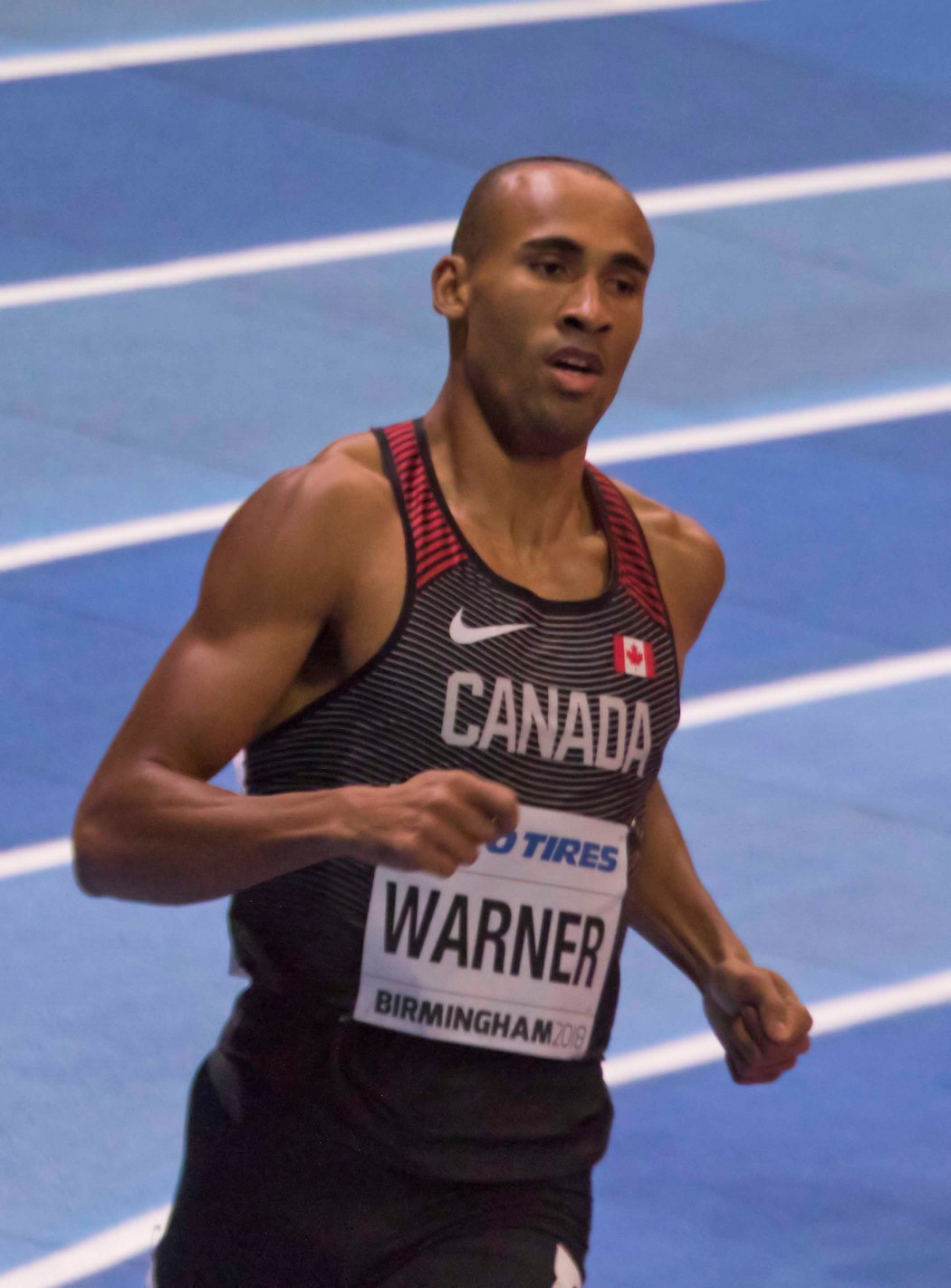 WK3B0180 1000m zevenkamp warner